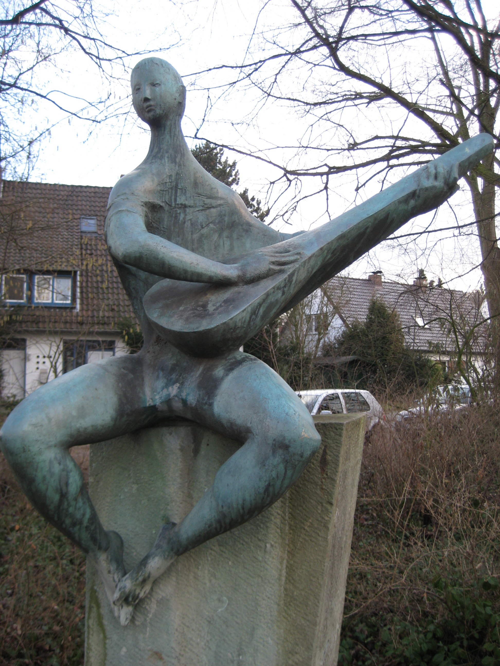 Hans-Gerd Ruwe: „Mann mit Laute“ Bronze, 1983, in Osnabrück, Grünanlage am Riedenbach